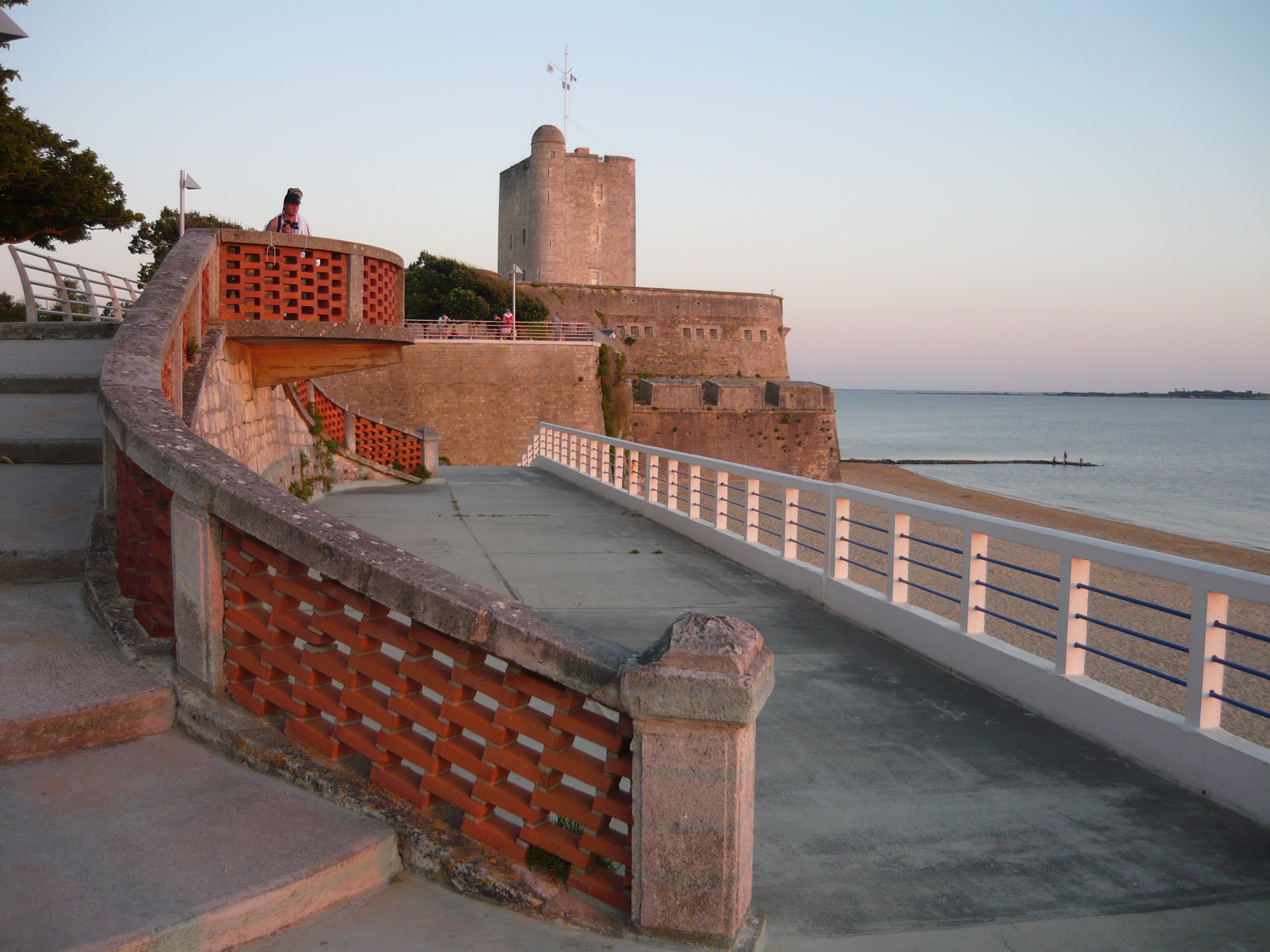 La plage Ouest avec vue sur le Fort-Vauban au coucher de soleil à Fouras (17)